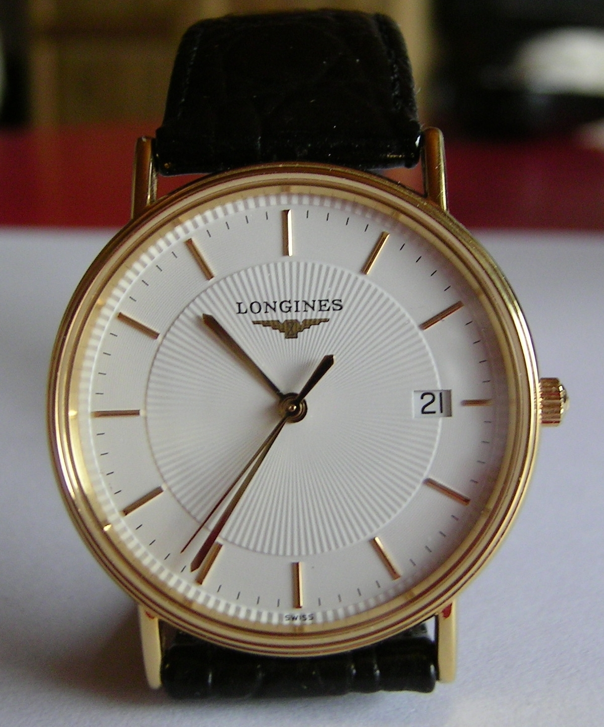 Armbanduhr Longines "Presence"